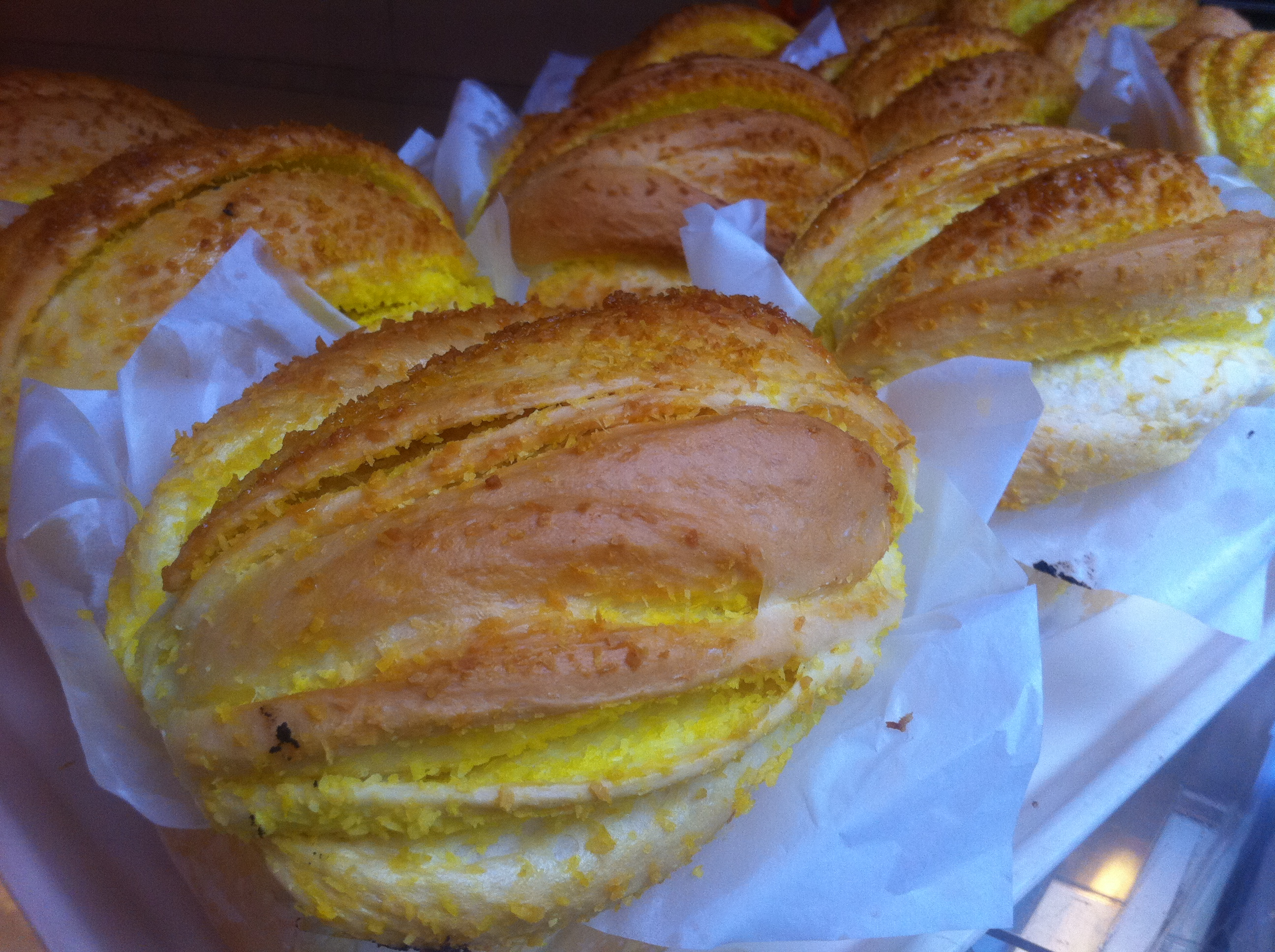 中文（香港）: 椰絲 甜麵包